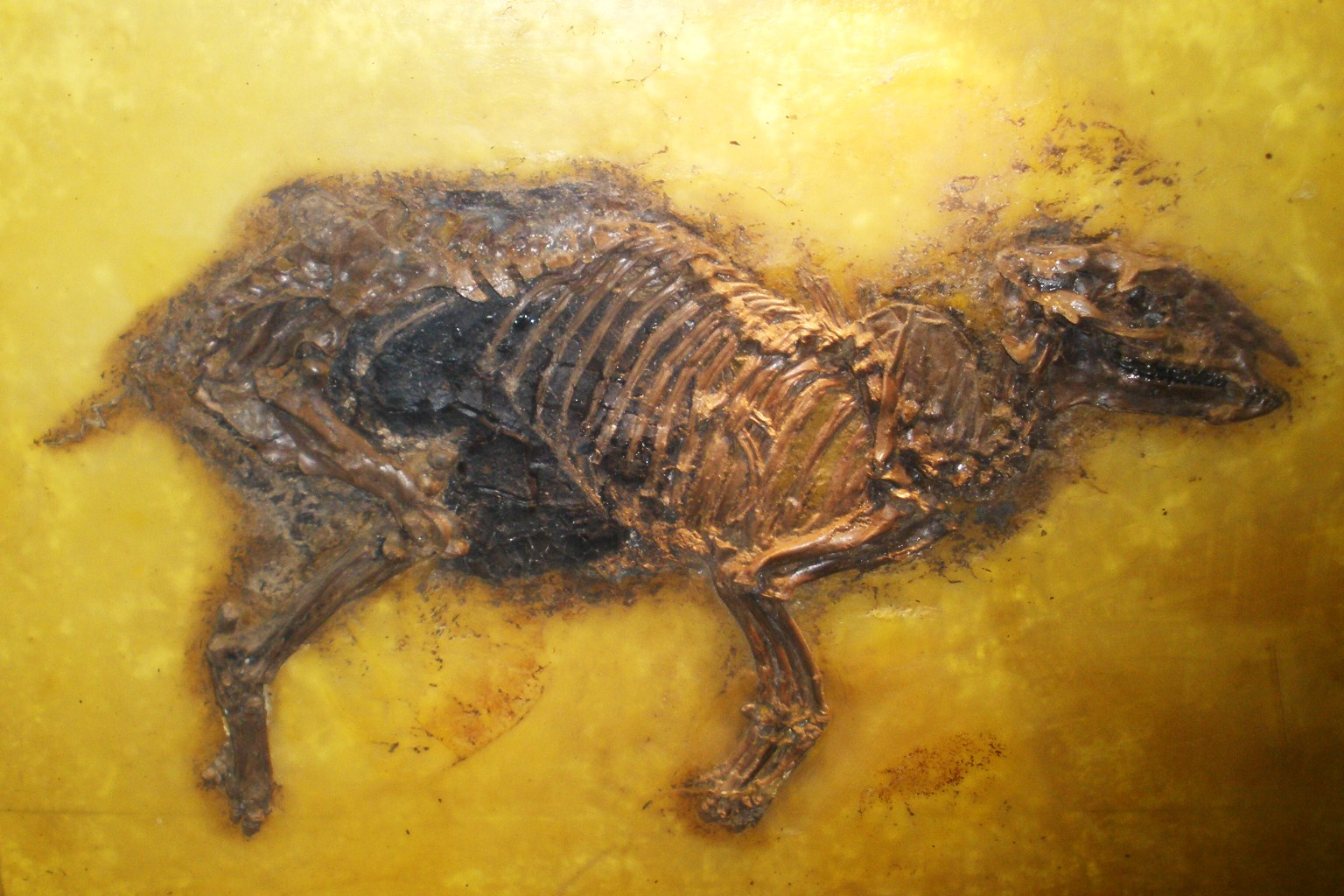 Fossil of Propalaeotherium, an extinct perissodactyl- Took the photo at Senckenberg Museum of Frankfurt